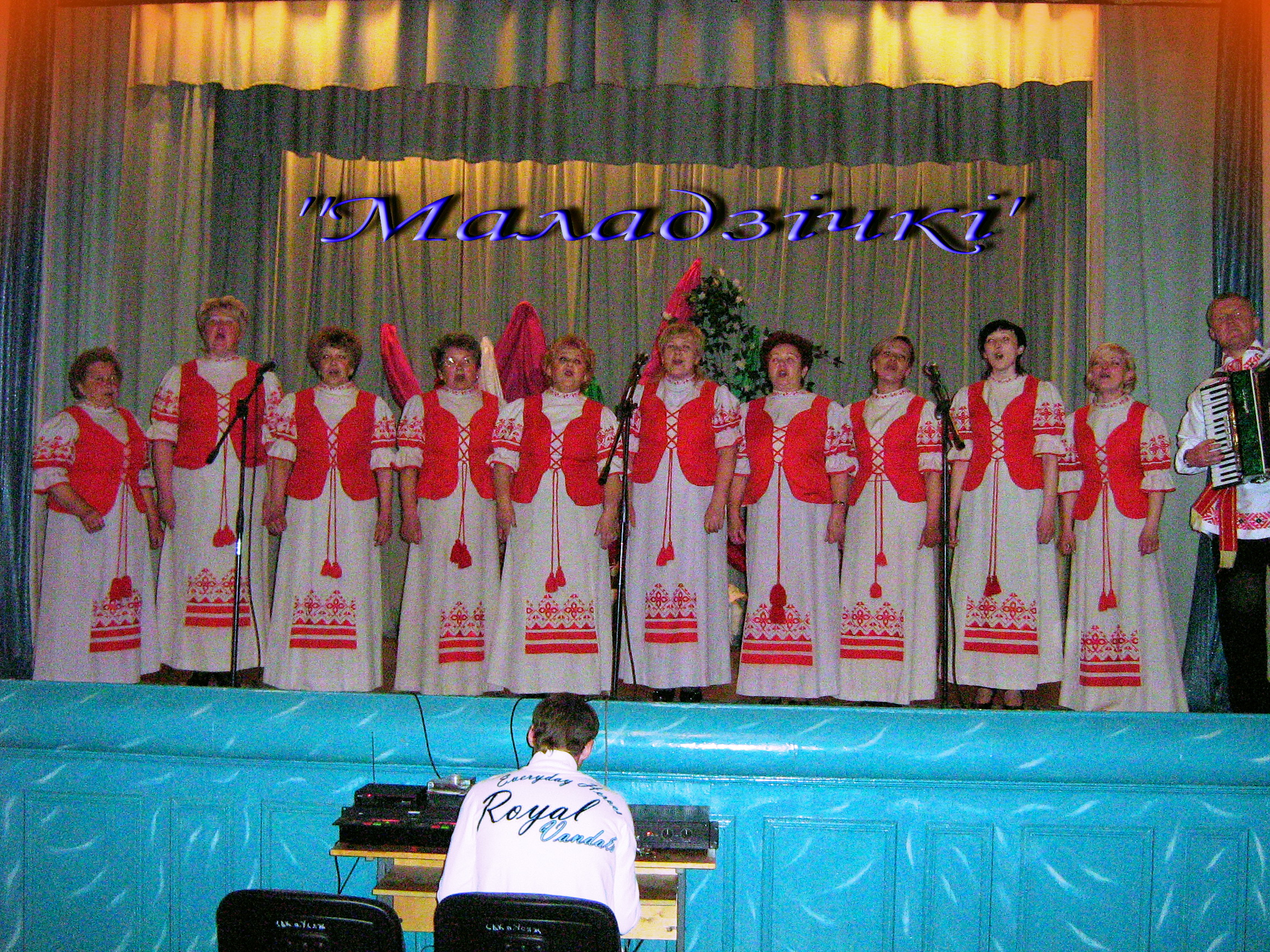 ансамбль